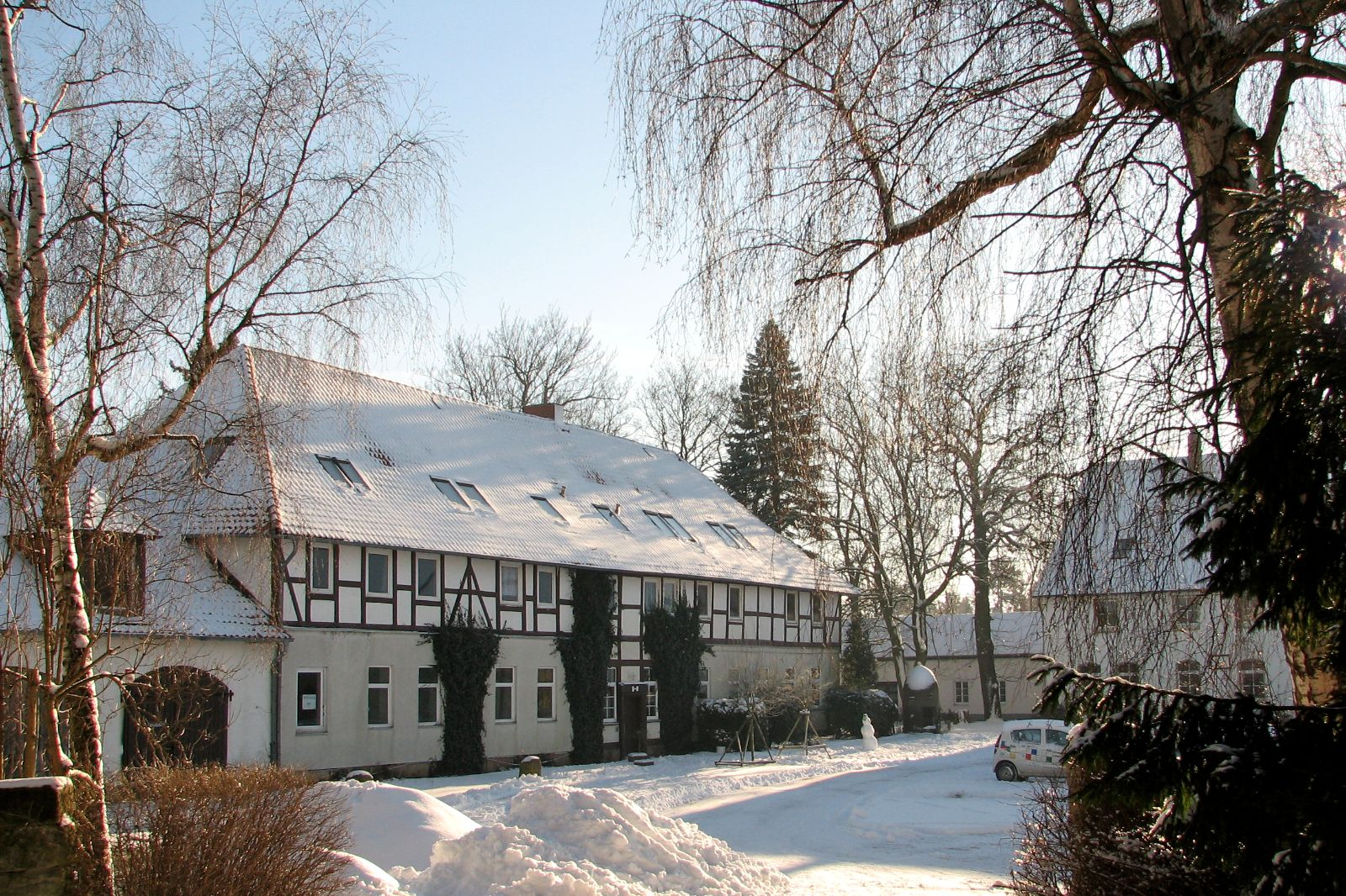 Innenansicht des Gutshofes von Salzgitter-Hohenrode